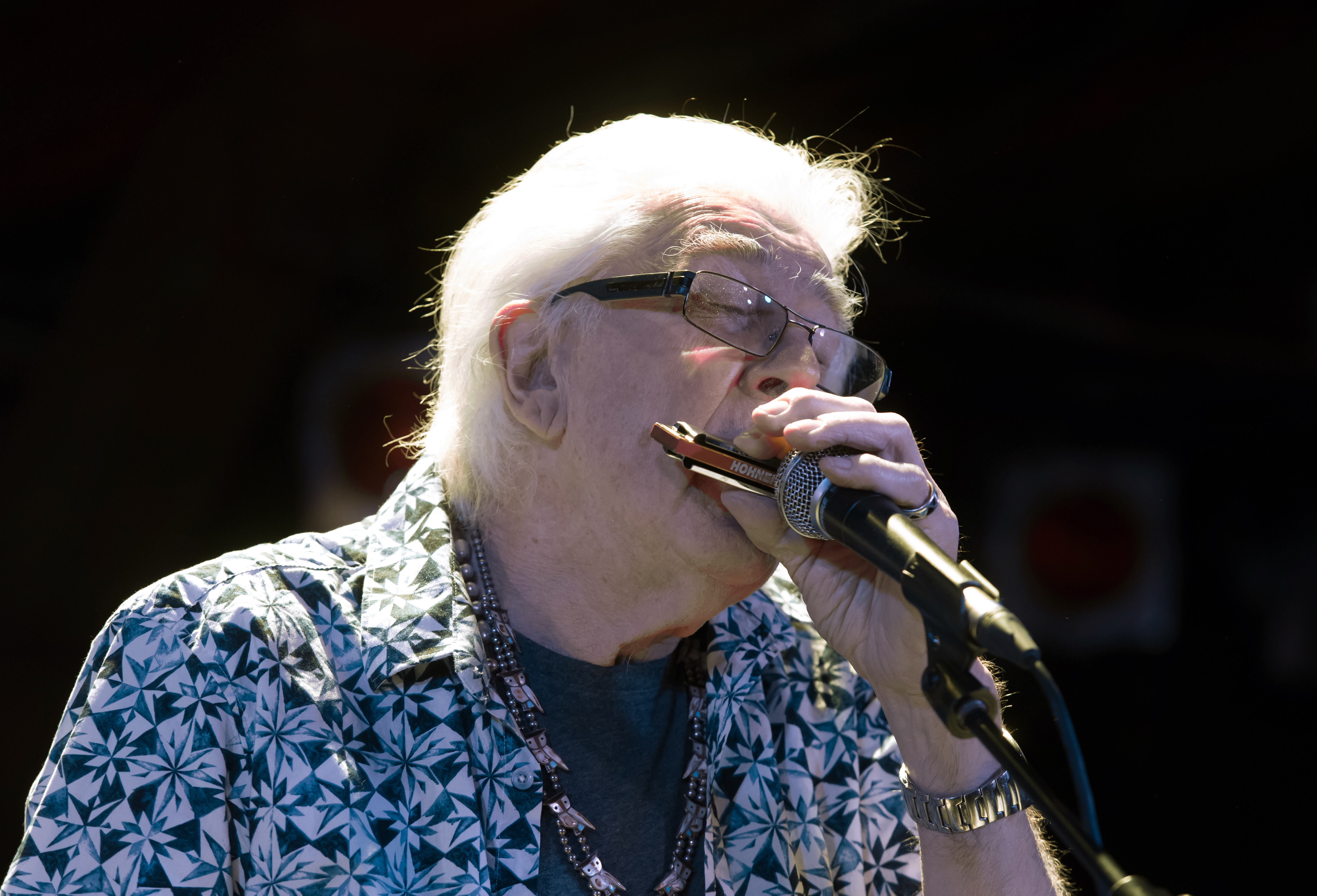 John Mayall in der Fabrik Hamburg 2017